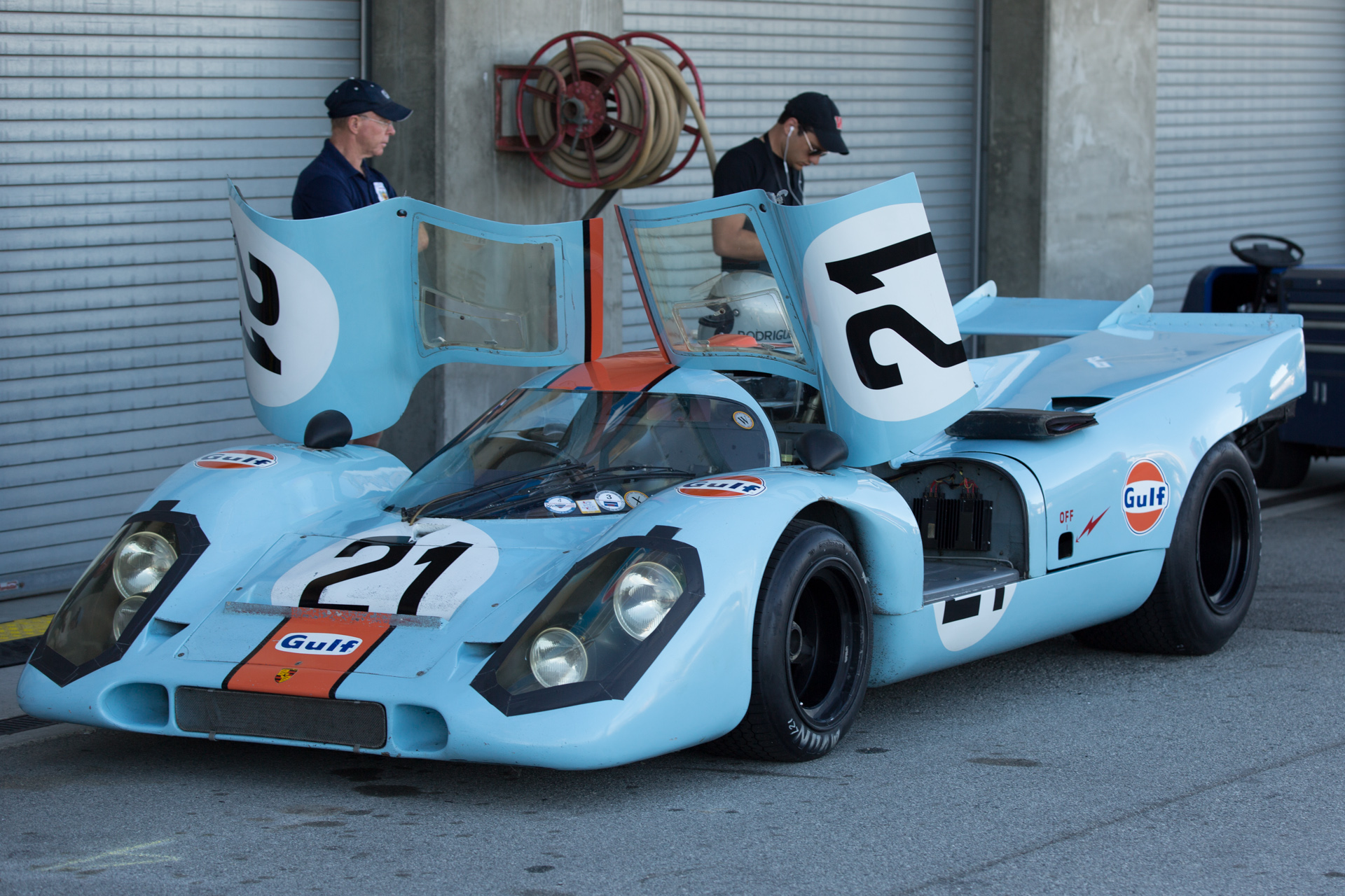 Rennsport Reunion V